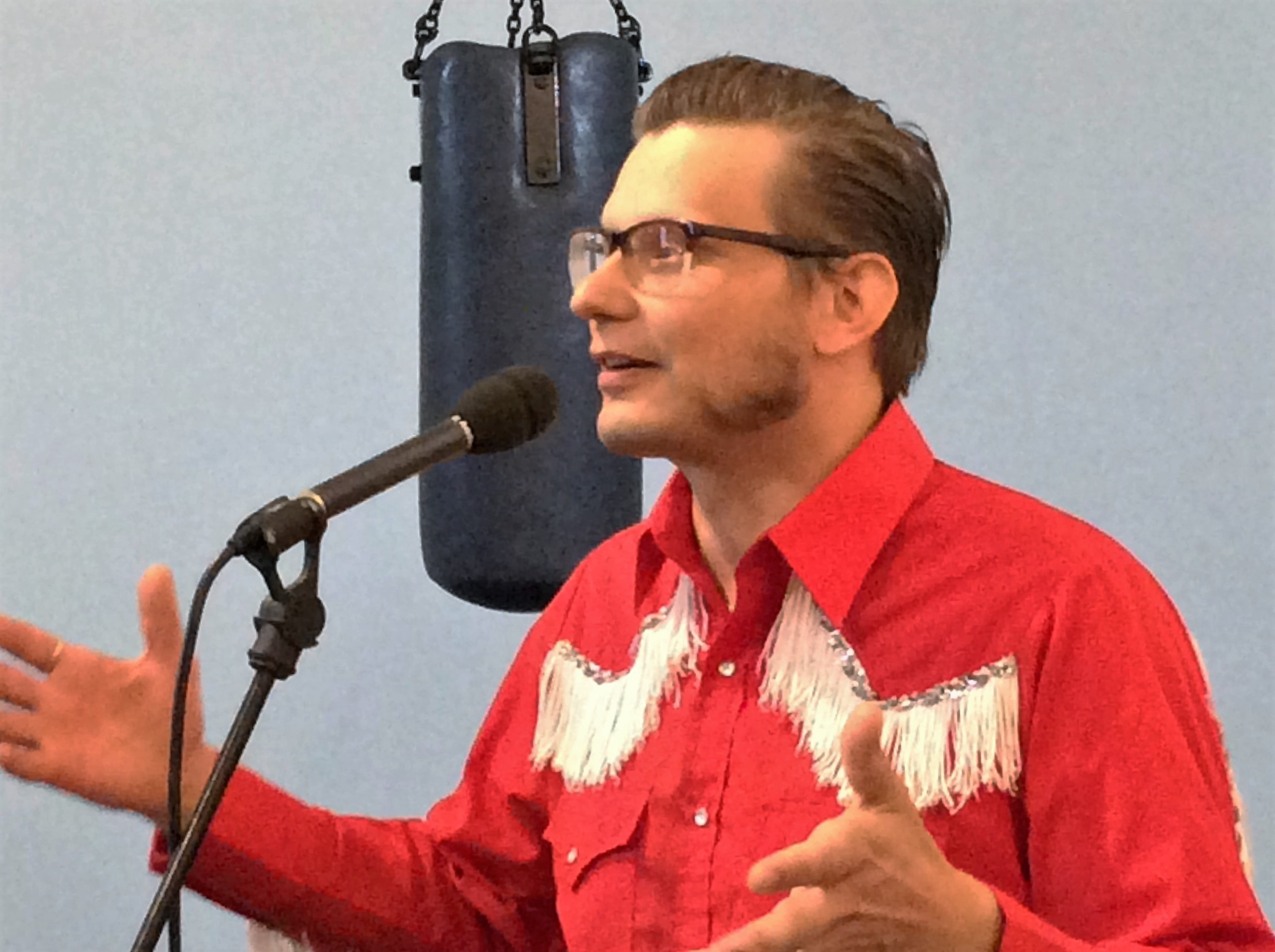 Kuva Anssi Kasitonnista vuonna 2016